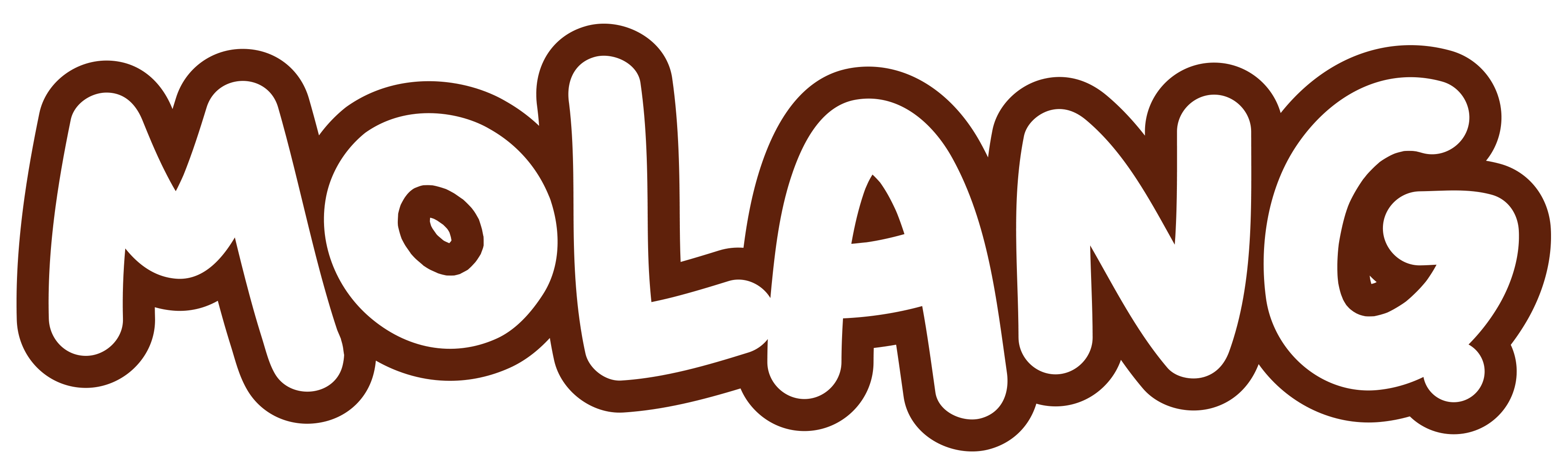 Logo Molang Blanc